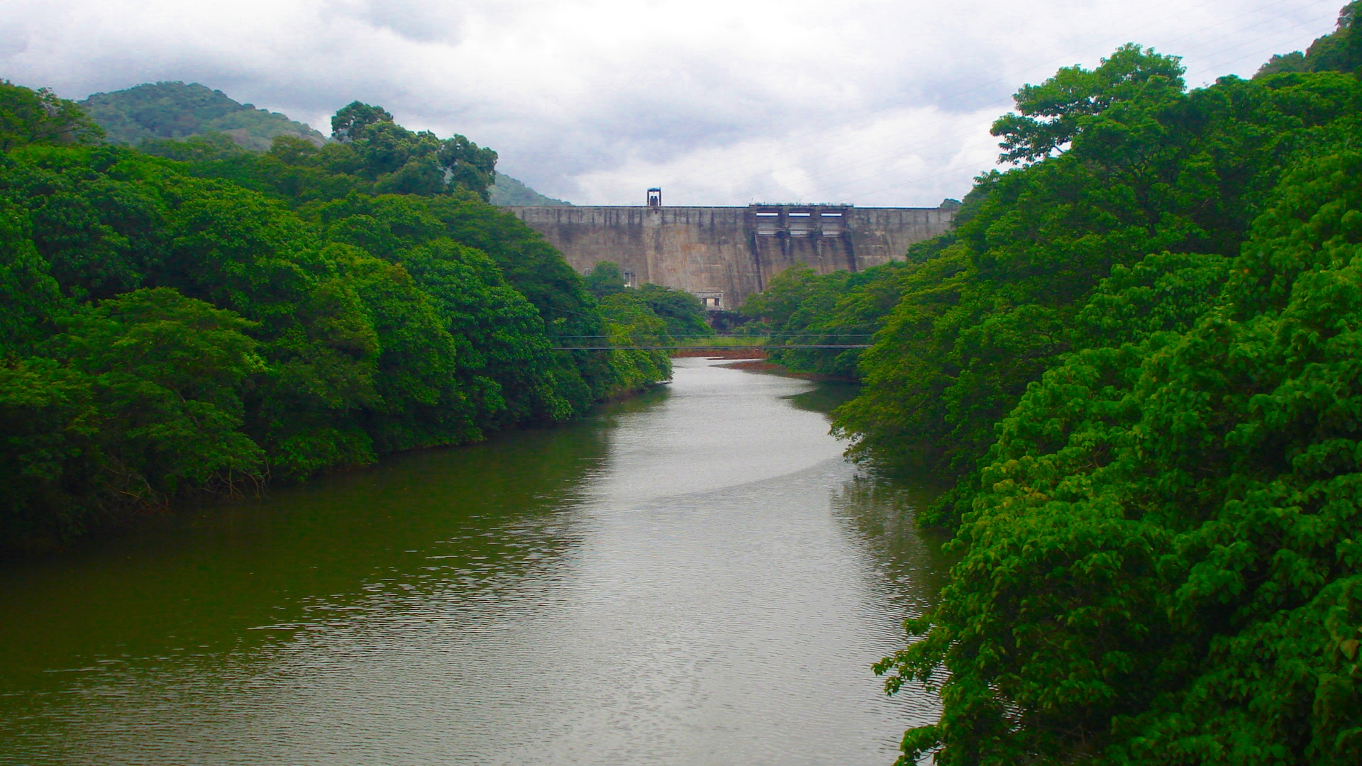 തെന്മല ഡാം